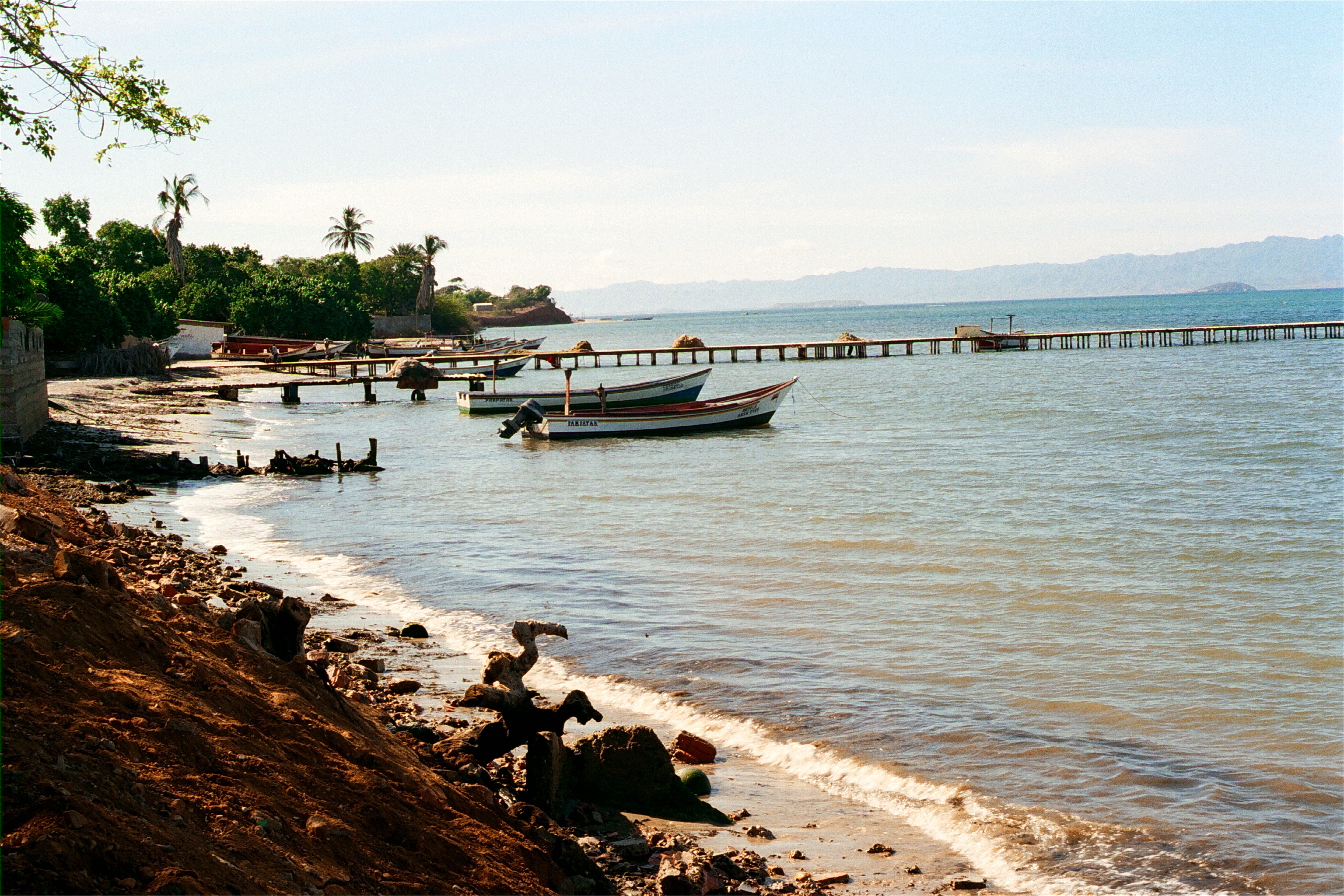 El Guamache, Isla de Coche, Nueva Esparta, Venezuela.